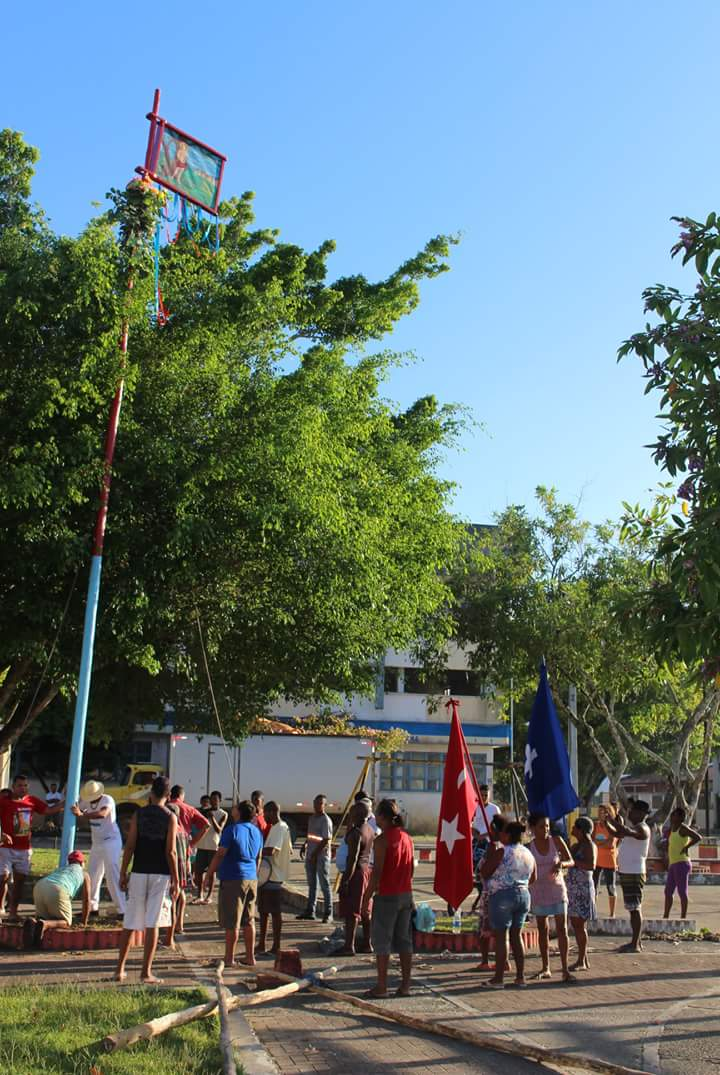 bsbsbnssnd